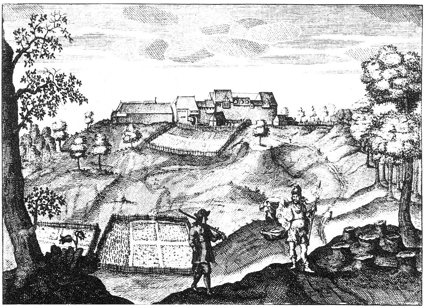 Burg Sternberg, Kupferstich von Elias van Lennep um 1663